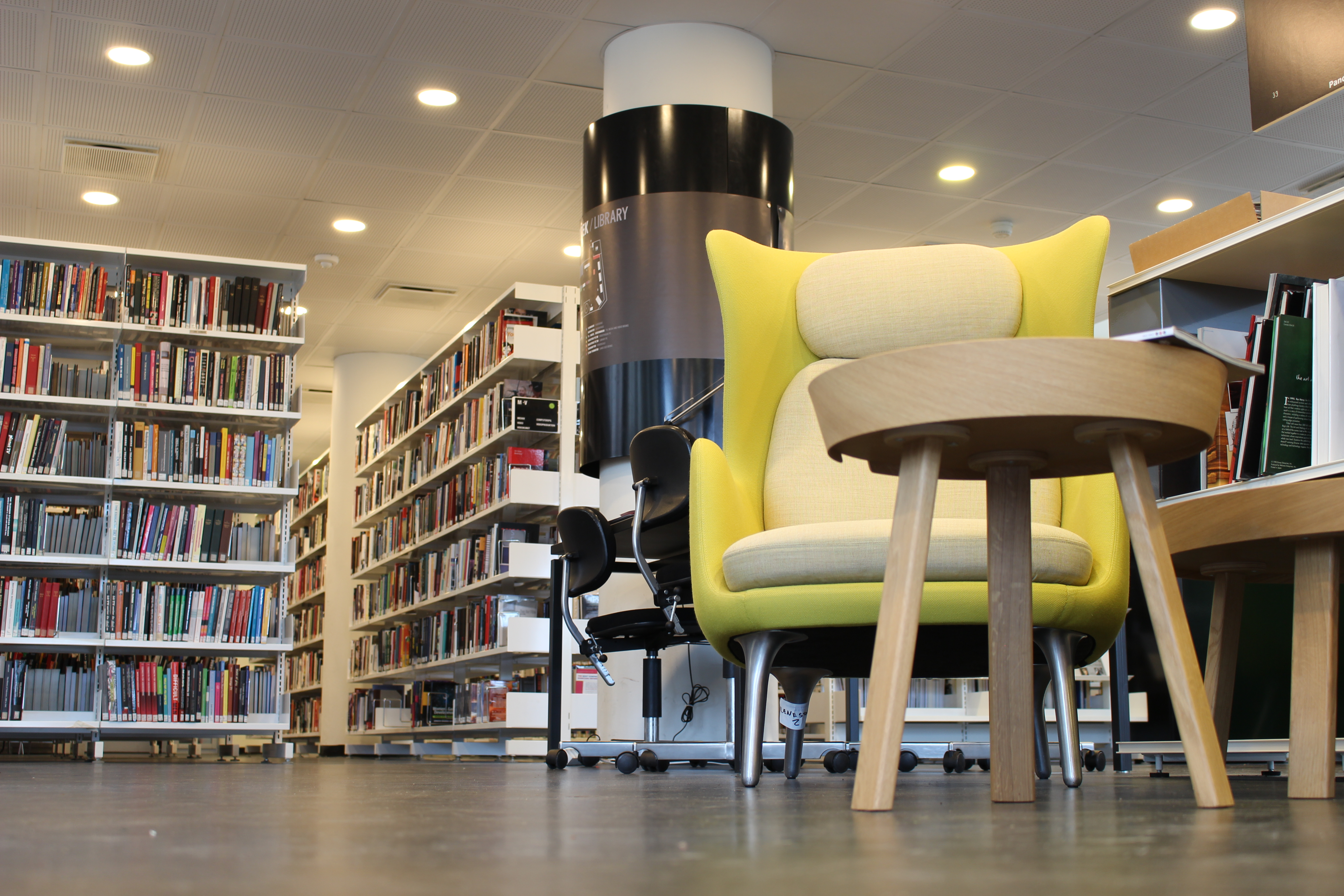 Det Danske Filminstituts Bibliotek, interiør